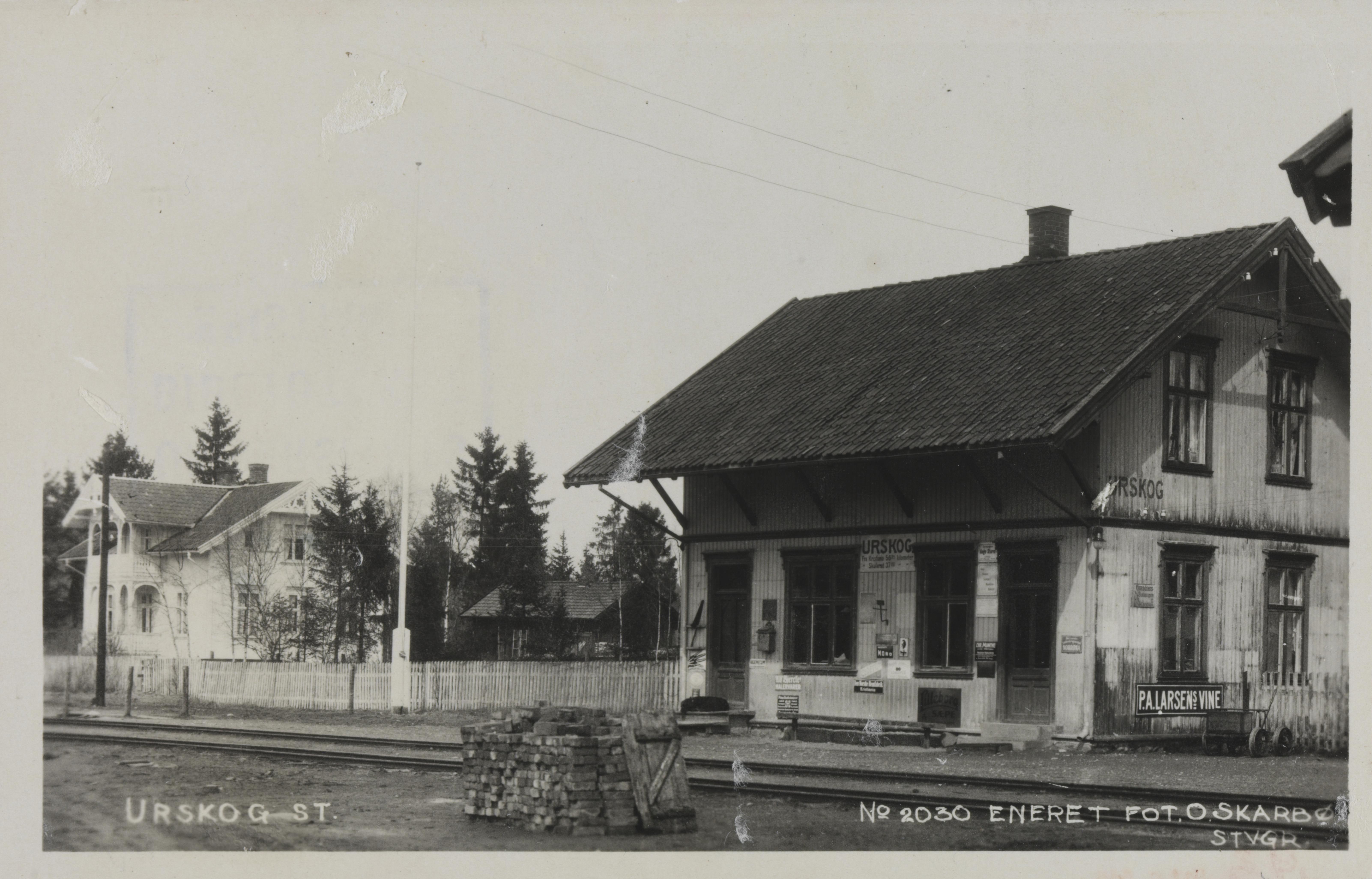 Bildet er hentet fra Nasjonalbibliotekets bildesamling Aurskog stasjon, Aurskog-Høland, Akershus